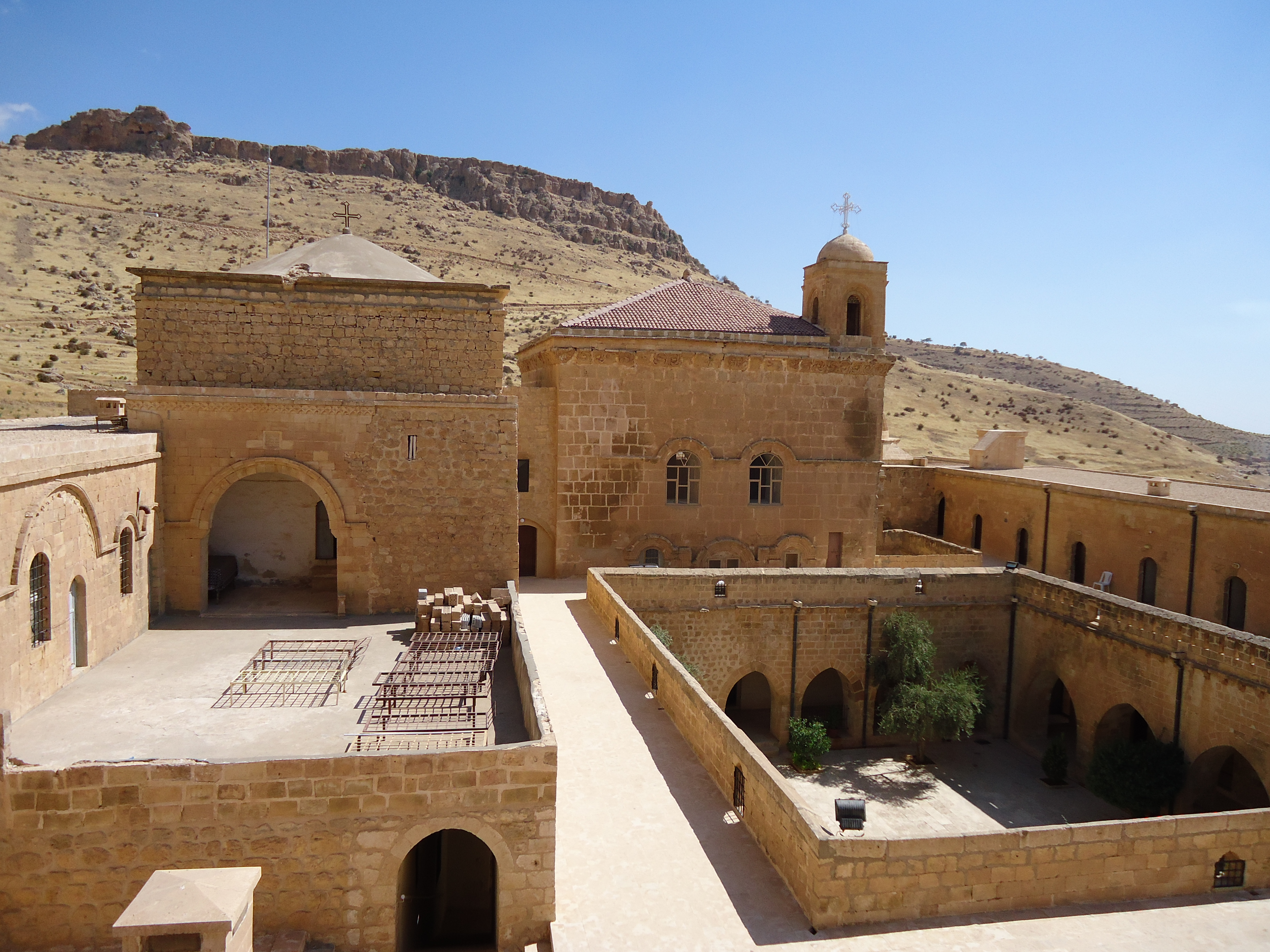 Kloster Zafaran, Tur Abdin